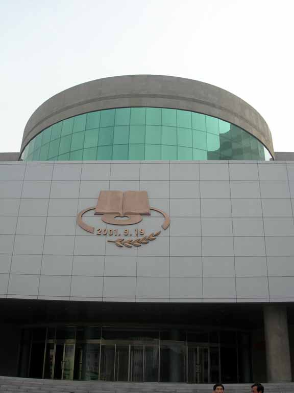 Japanese(日本語) : 金策工業総合大学の電子図書館外観 Korean(한국어) : 김책공업종합대학의 전자도서관